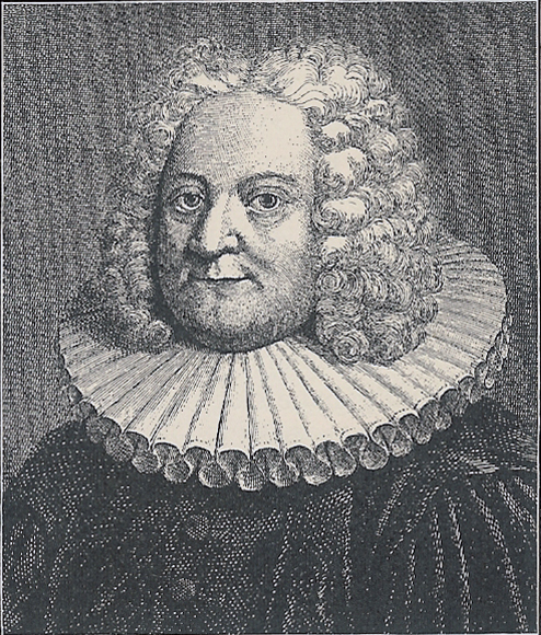 Biskop Bartholomæus Deichman. 1671-1731.